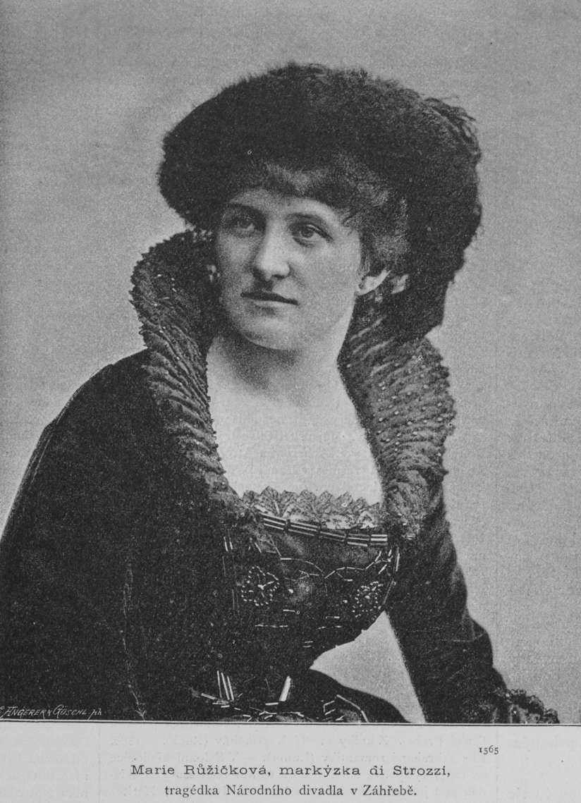 Marie Růžičková-Strozzi (Zlatá Praha 1886)